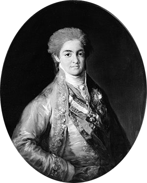 Boceto preparatorio para La familia de Carlos IV